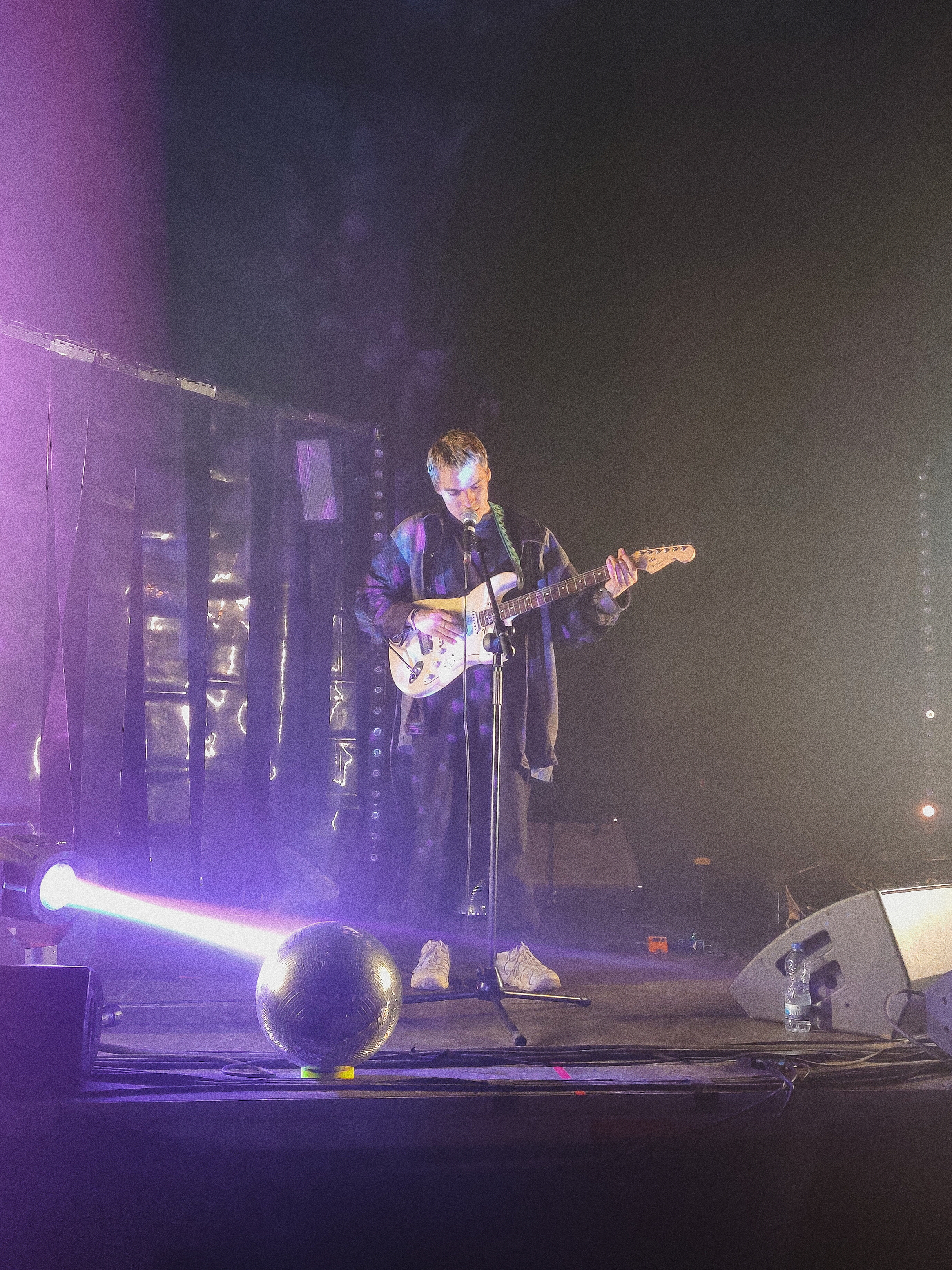 Sega Bodega actuando en LEV Madrid 2019